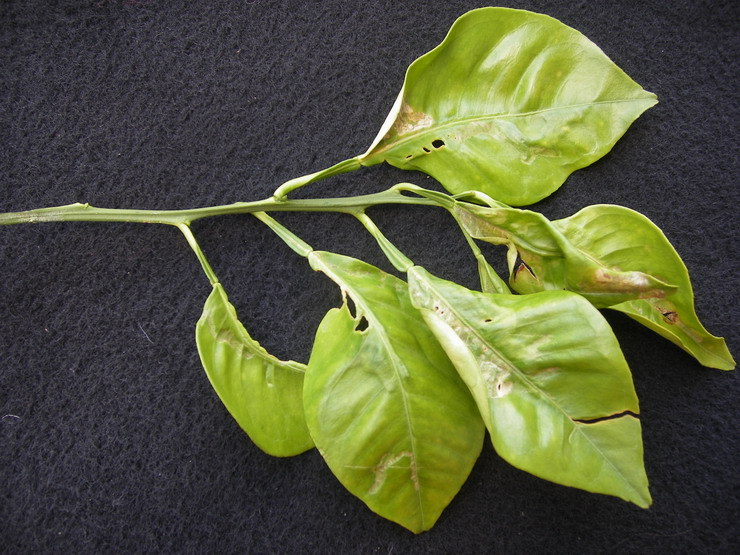 Germoglio danneggiato da P. citrella. Foto scattata personalmente. Michele Iannizzotto